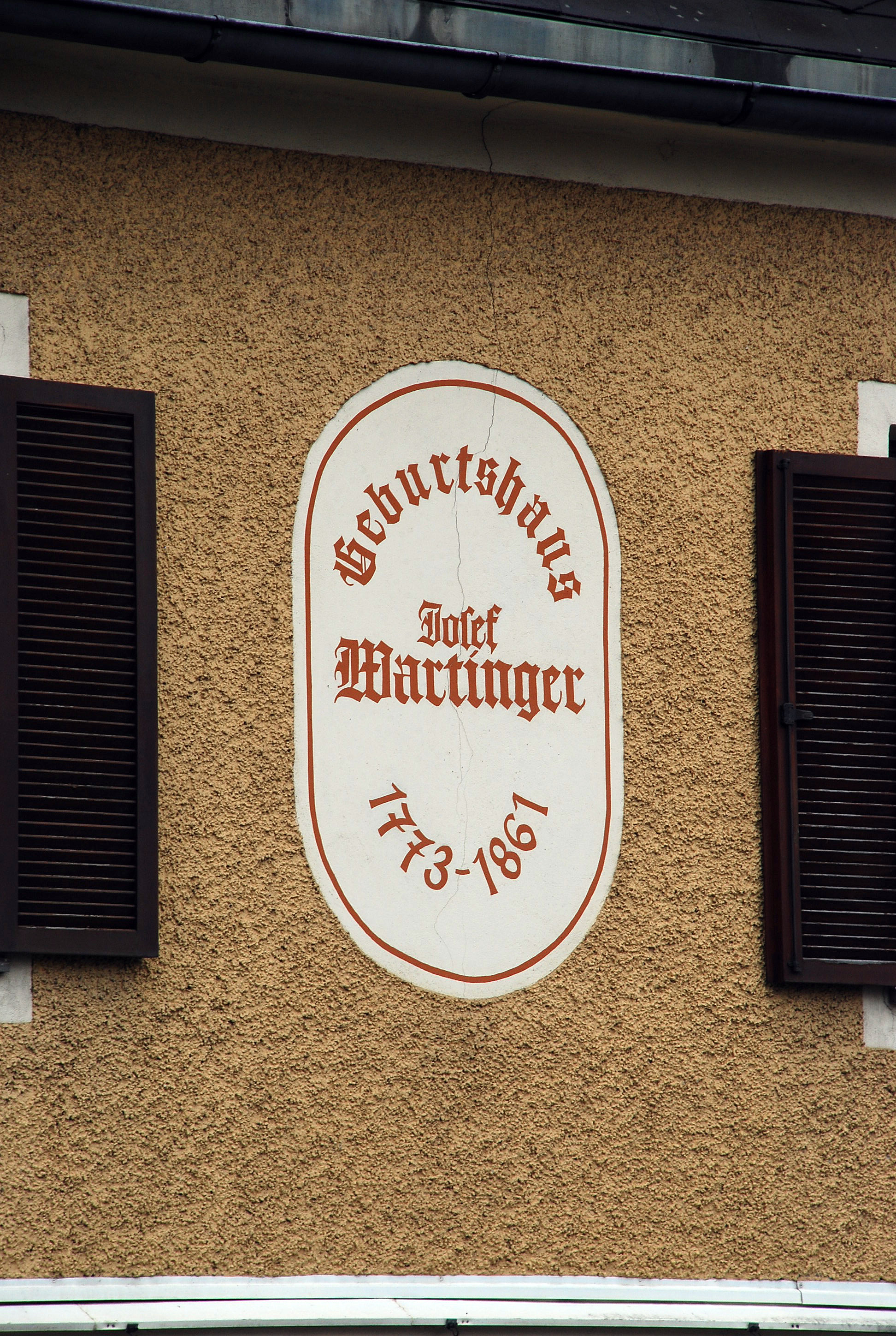 Erinnerungstafel in Sankt Stefan ob Stainz, am Haus im Ortsgebiet an der Straßenkreuzung Richtung Gundersdorf, Stainz und Graz